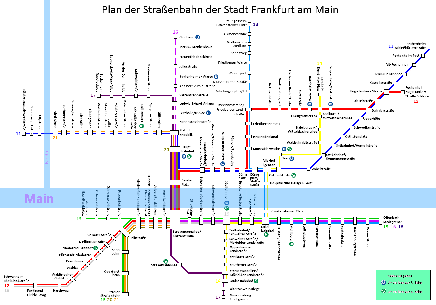 Schematischer Netzplan der Straßenbahn Frankfurt am Main V2.7.5. Das heutige Straßenbahnnetz (ohne Ebbelwei-Expreß)